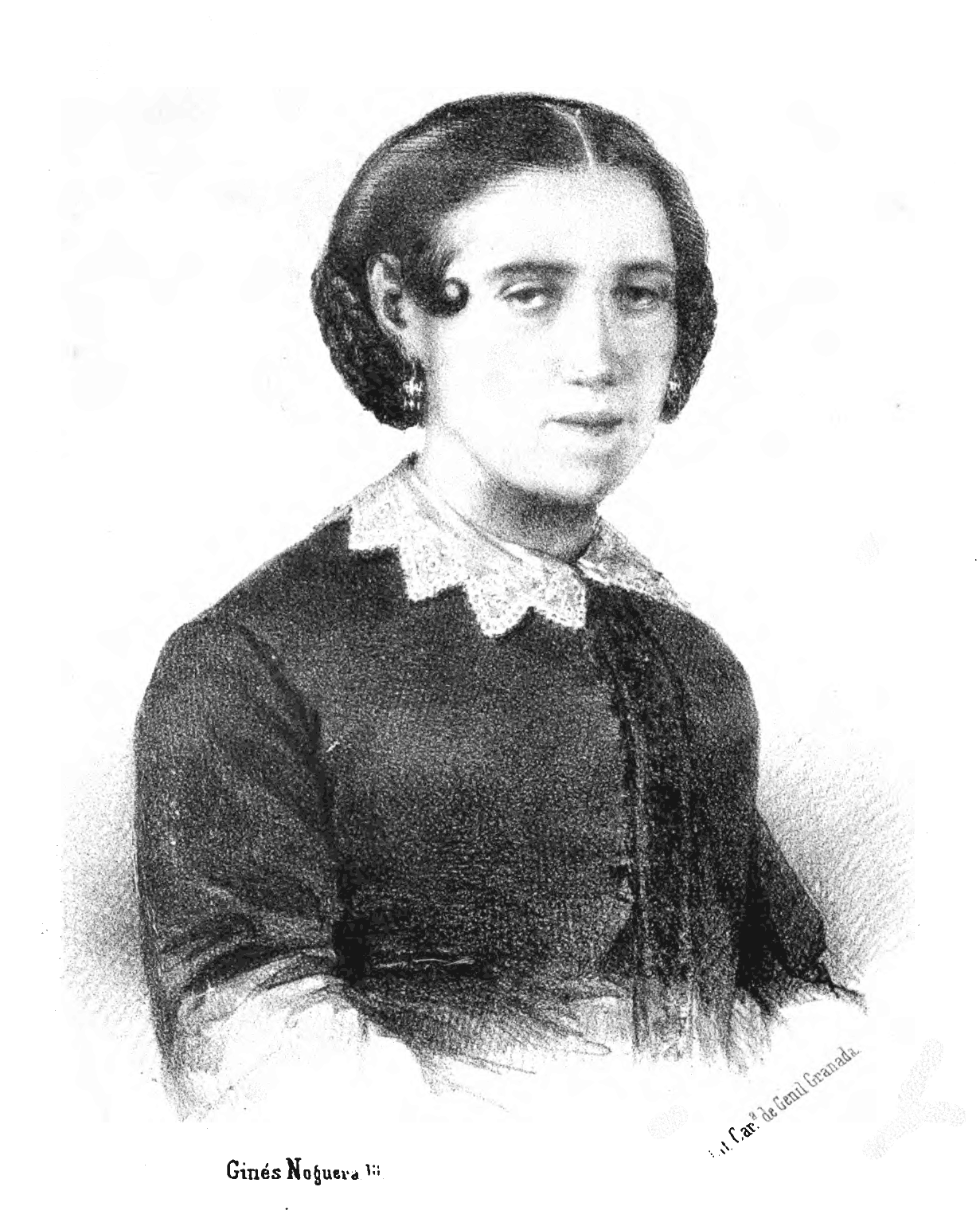 Retrato de Enriqueta Lozano de Vílchez (1829-1895), escritora de Granada